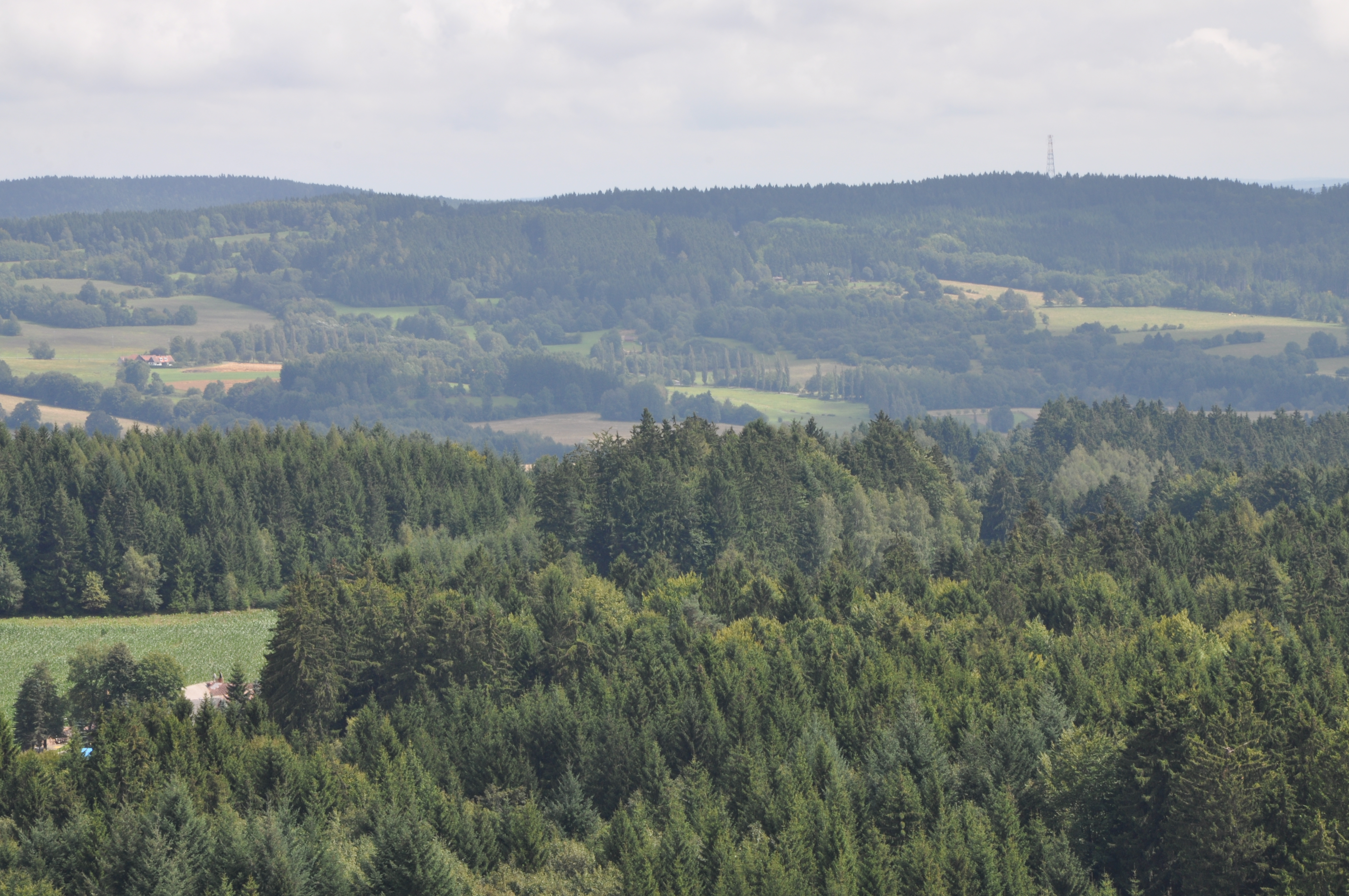 výhled na Čeřínek